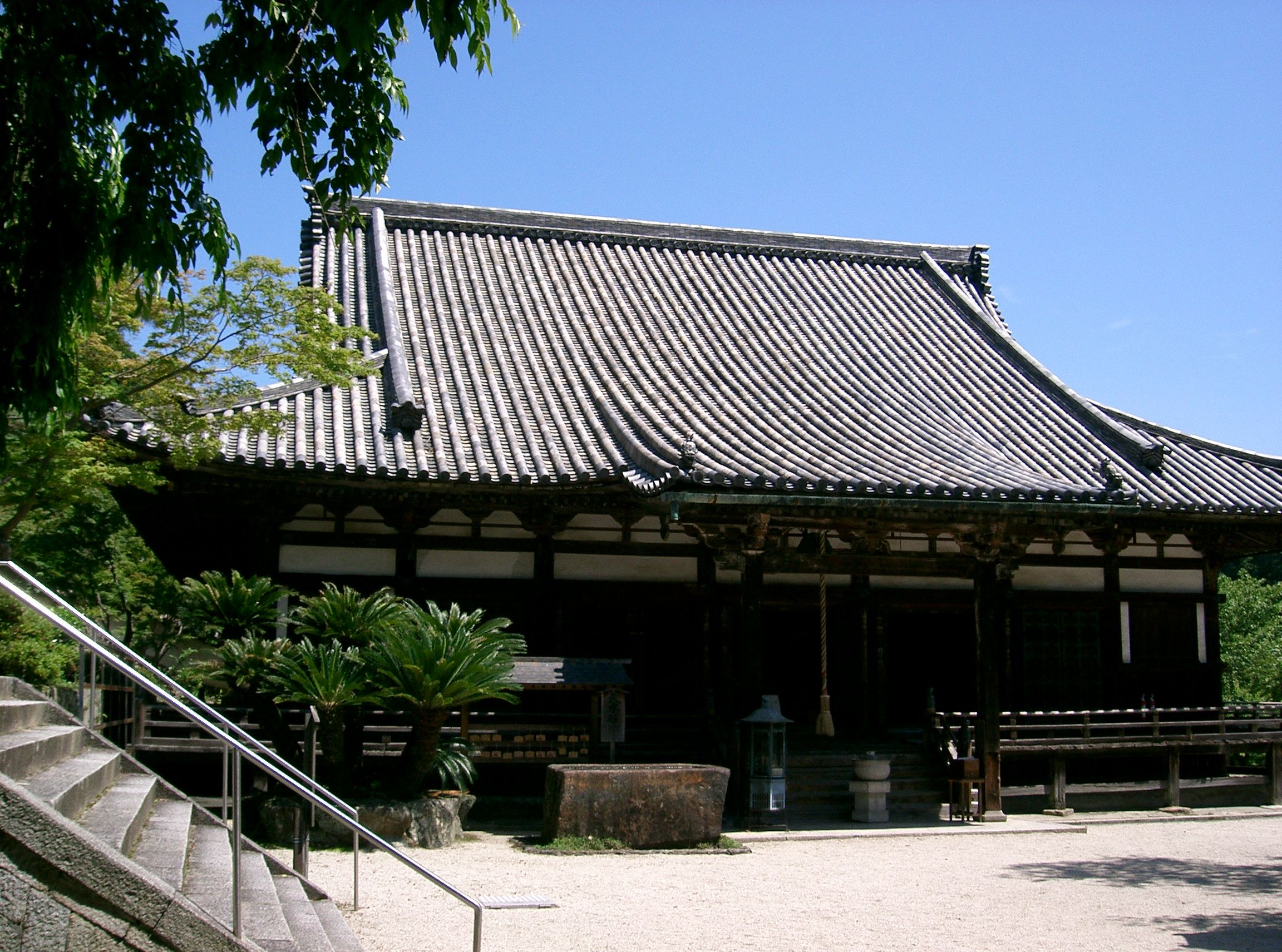 金剛寺 金堂